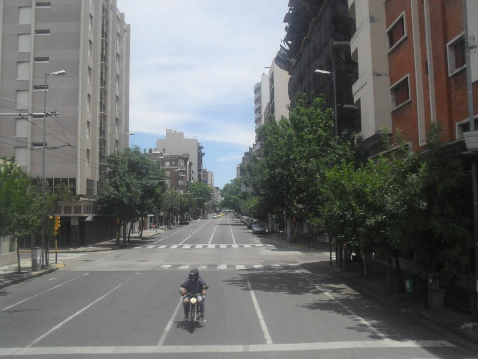 Vista hacia el oeste de la avenida Emilio Olmos. Córdoba Capital. Argentina.